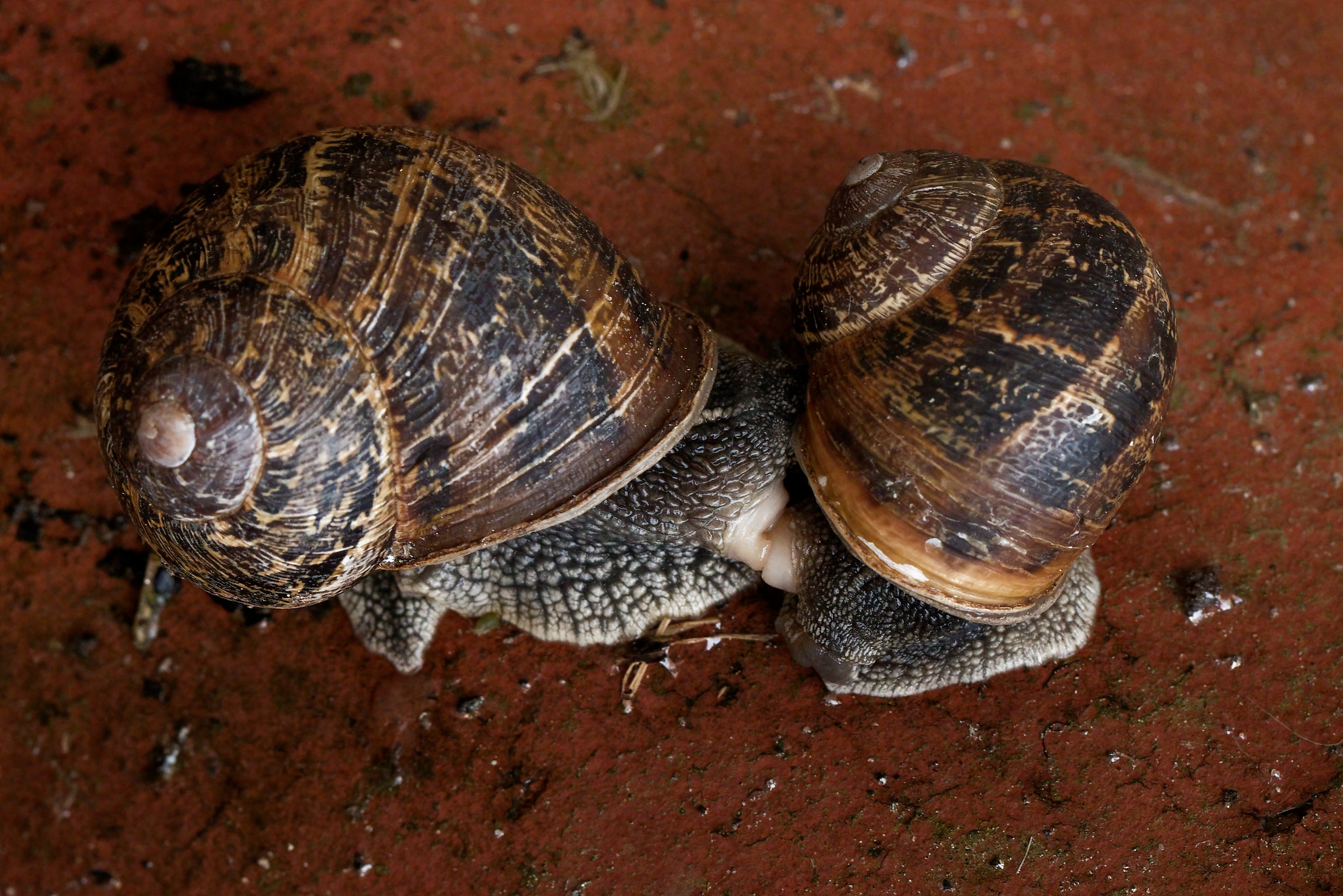 Cliché de la reproduction de deux escargots.